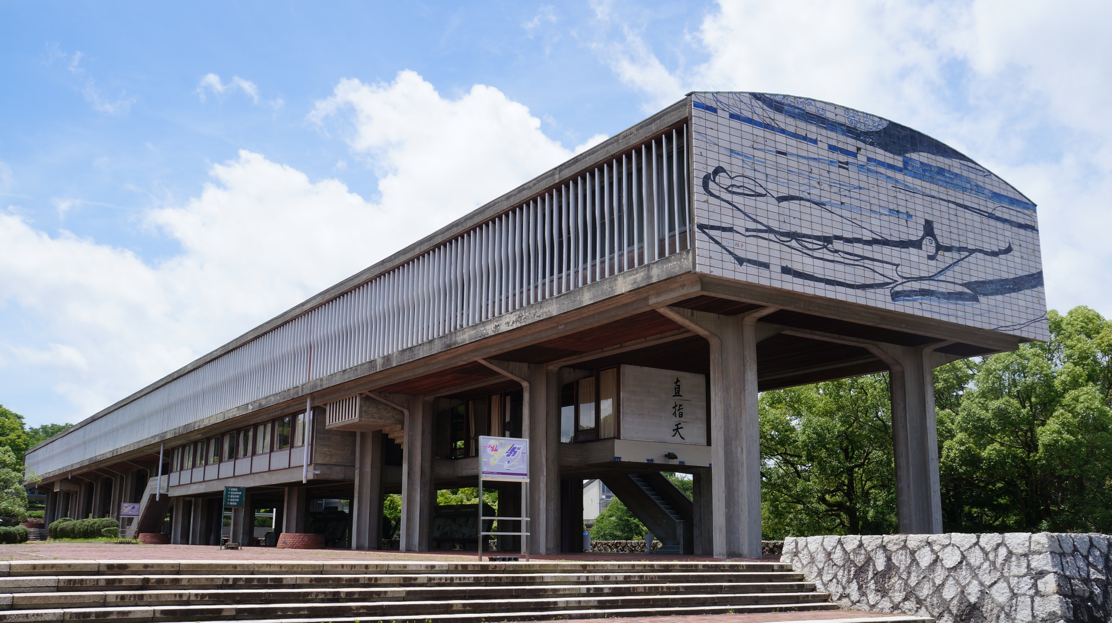 愛知県立芸術大学（愛知県長久手市）・講義棟